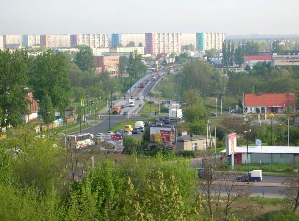 Widok z Kapuścisk w kierunku osiedla Bartodzieje w Bydgoszczy